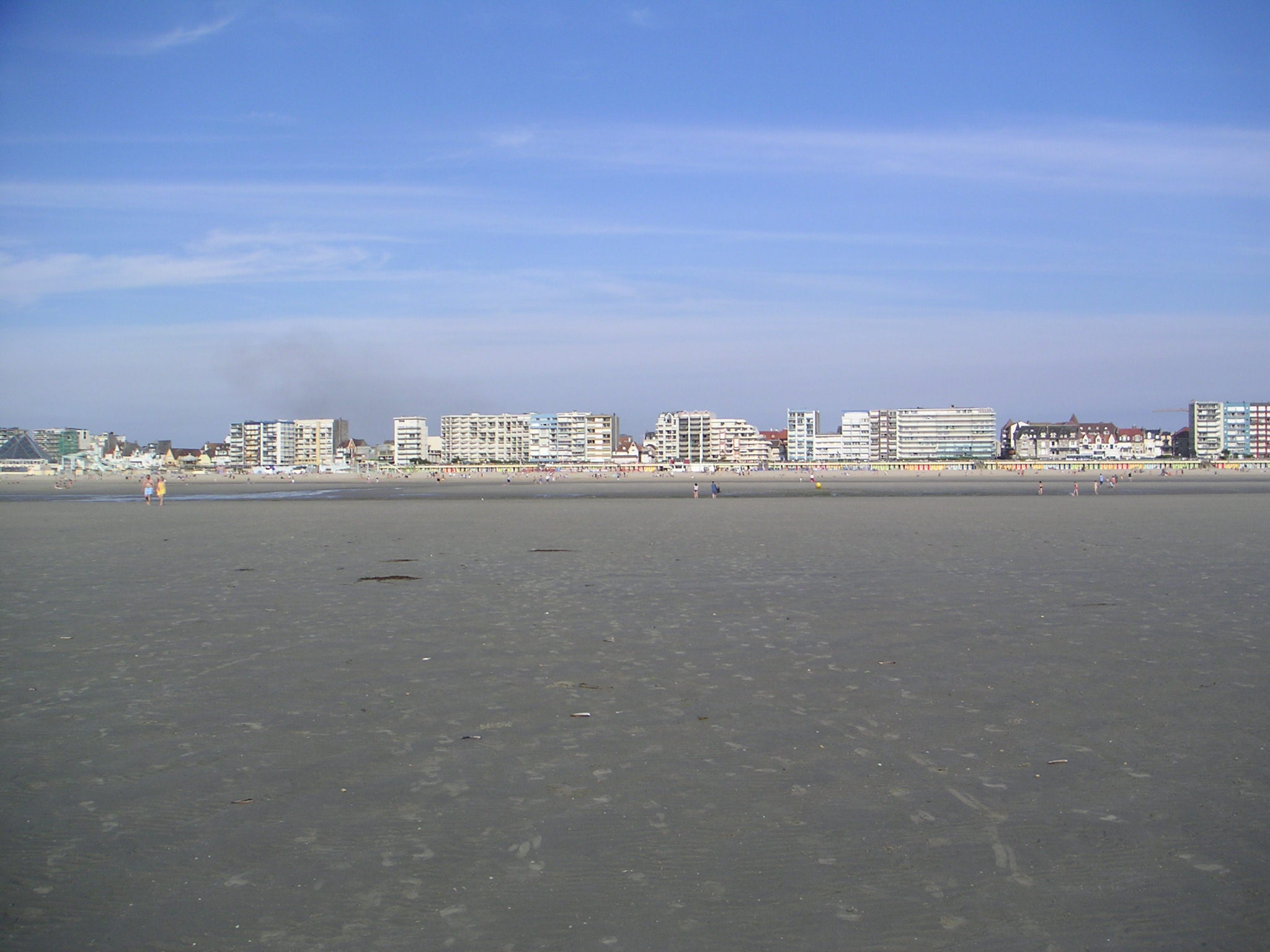 Photos prises dans la commune du Touquet-Paris-Plage